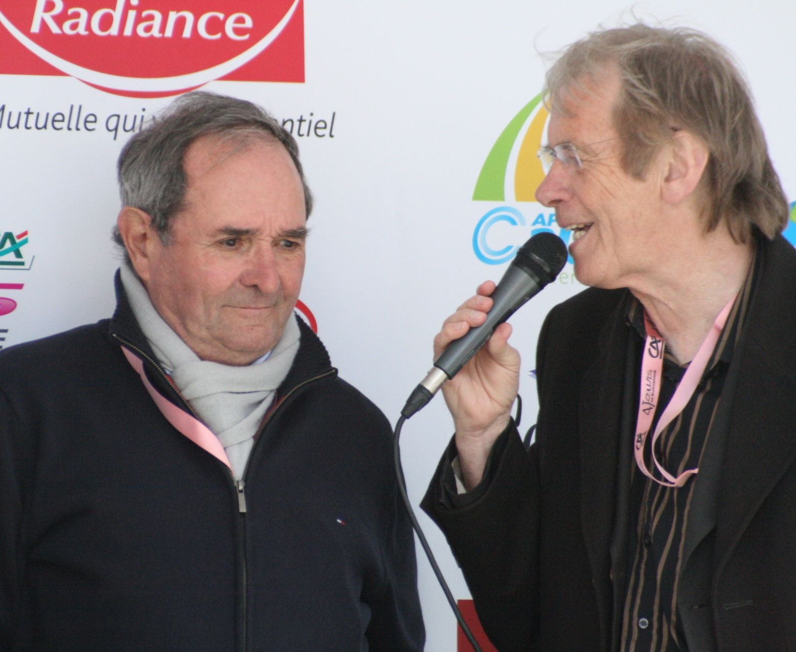 Daniel Mangeas interroge Henry Anglade sur le podium de la 1re étape des Quatre jours de Dunkerque 2010